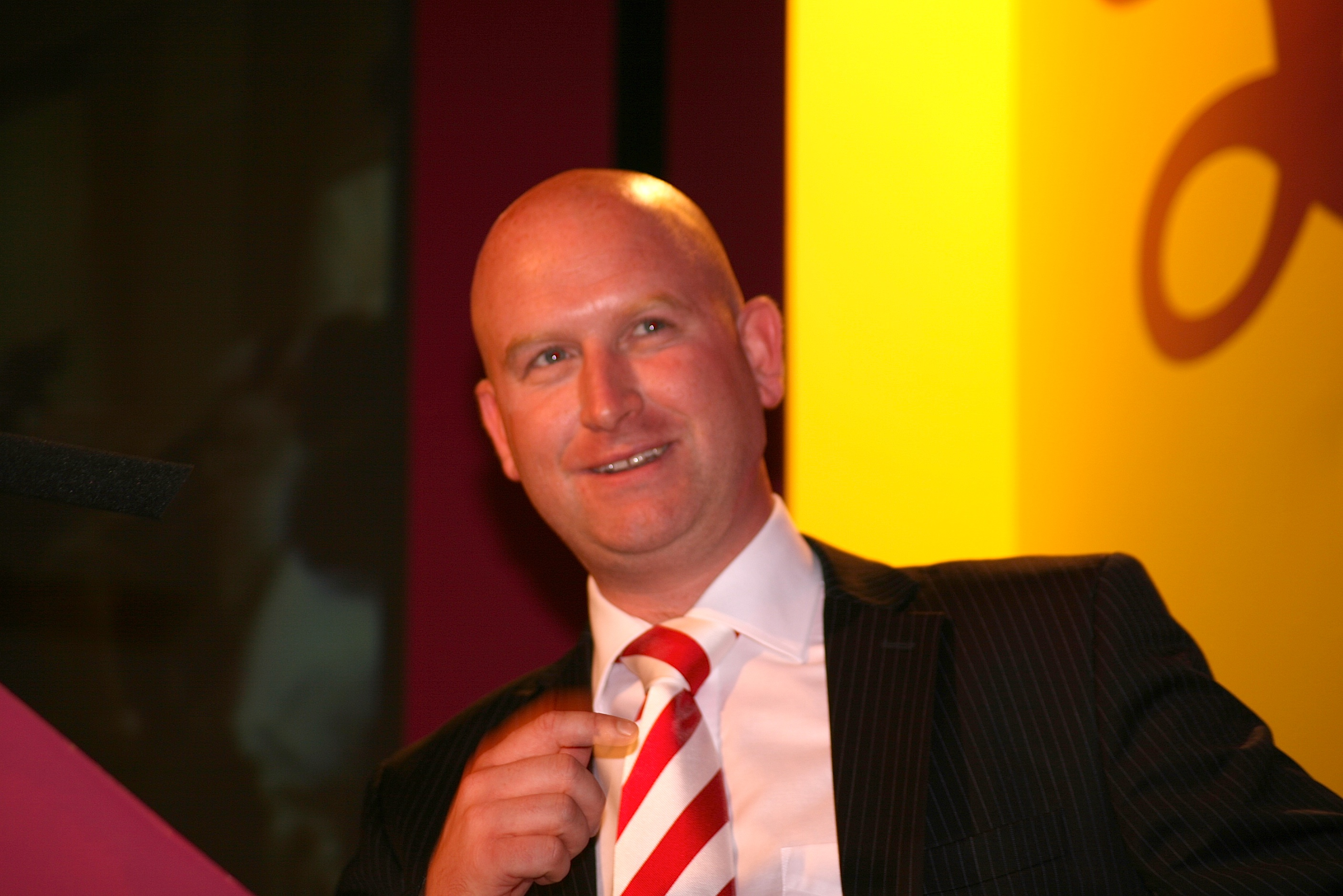 Paul Nuttall